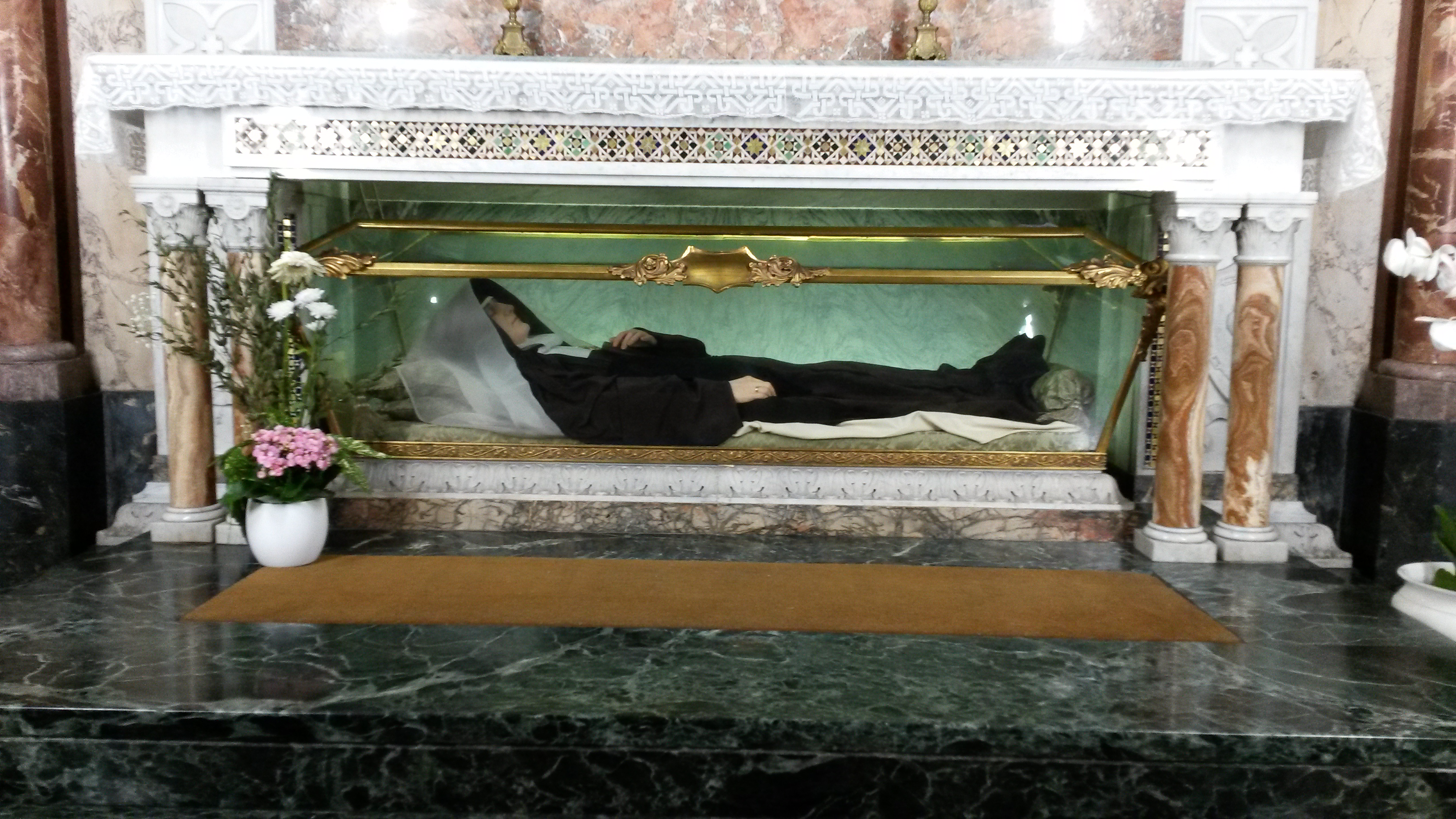 Urna con los restos de santa María Rafaela del Sagrado Corazón en la Iglesia del Sacro Cuore en Roma